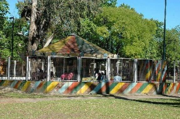 Foto de la Calesita del Parque Saavedra en la Ciudad de Buenos Aires - Argentina